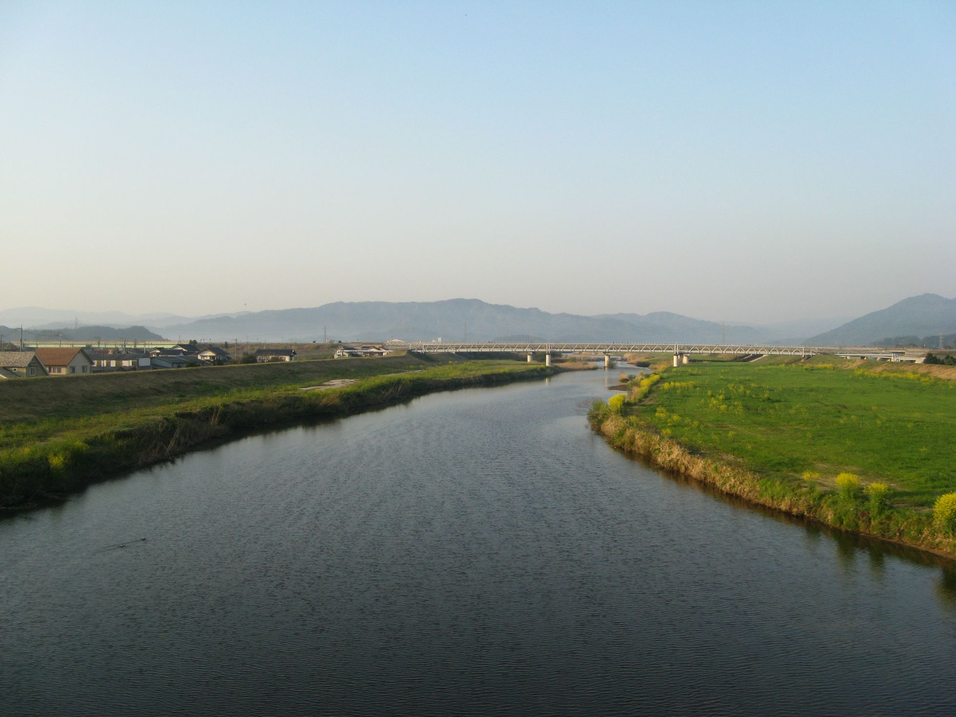 飯梨川 山陰本線から南望